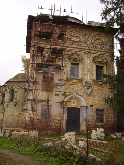 Покровский храм в усадьбе Мещерское в начальный период реставрации